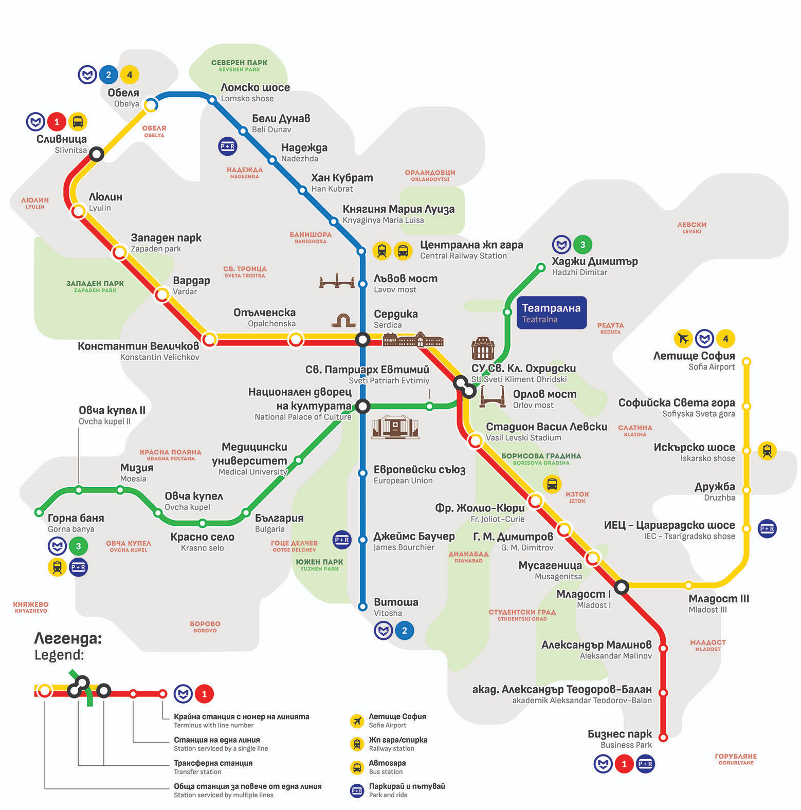 Схема на софийския метрополитен